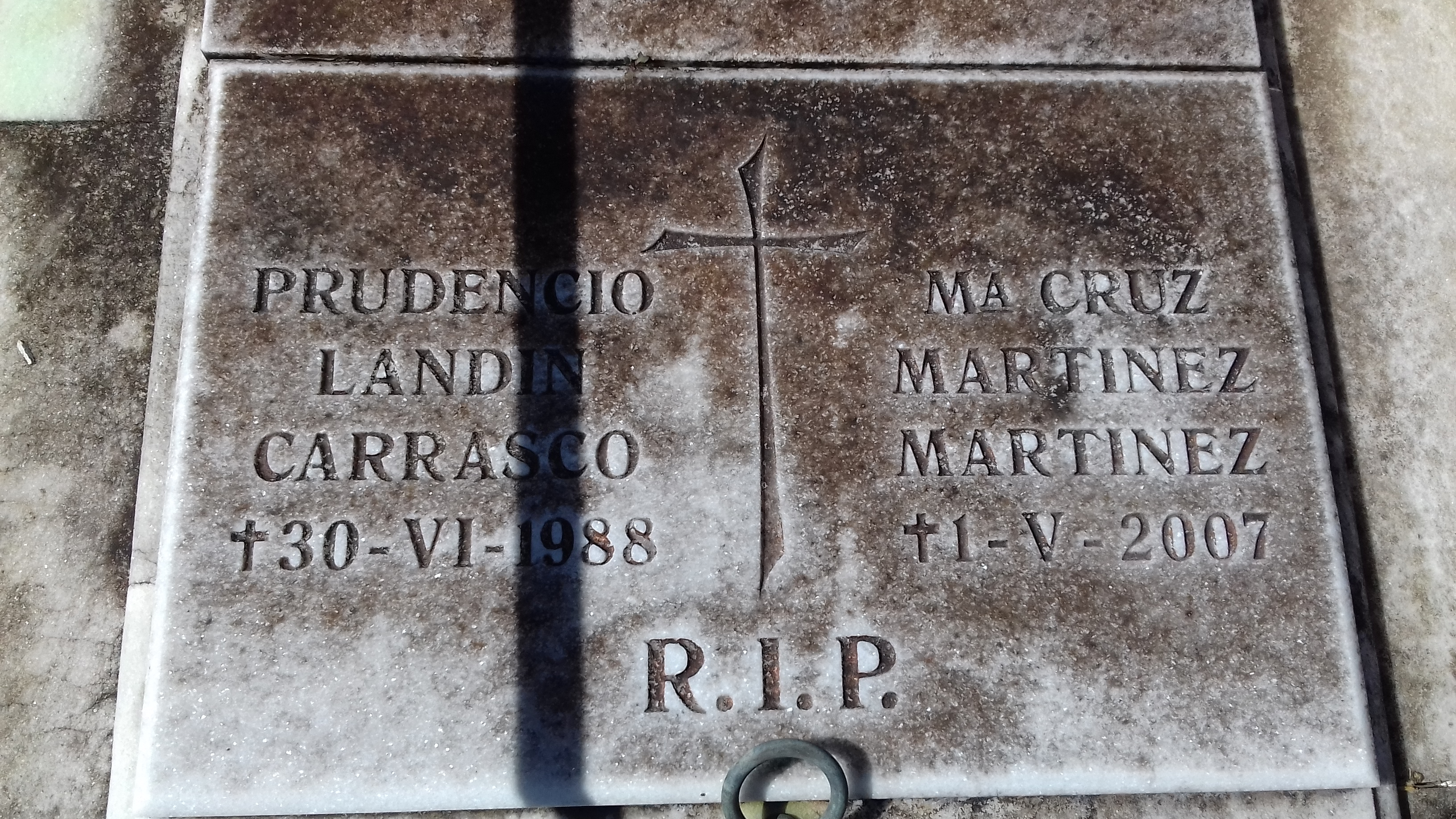 Lápida de Prudencio Landín Carrasco e María Cruz Martínez Martínez